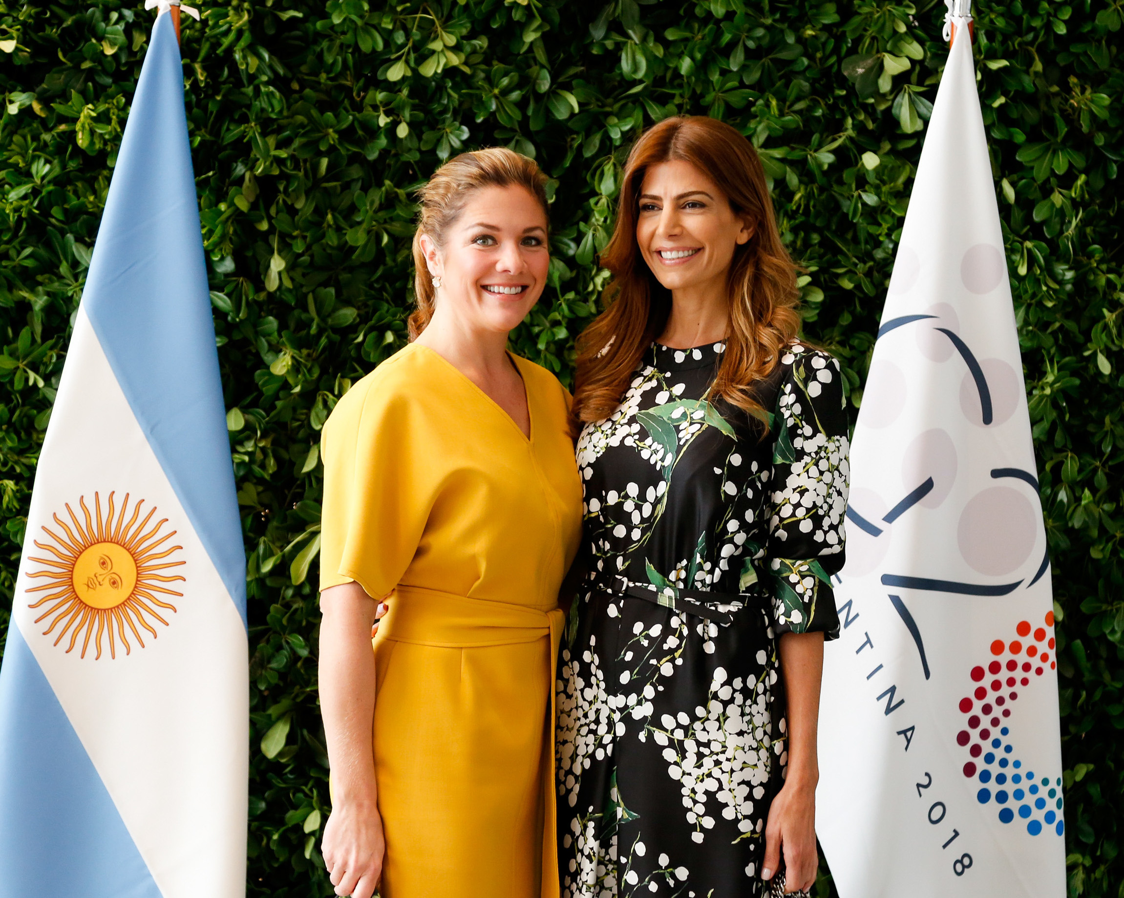 Partners Programme - Day 2